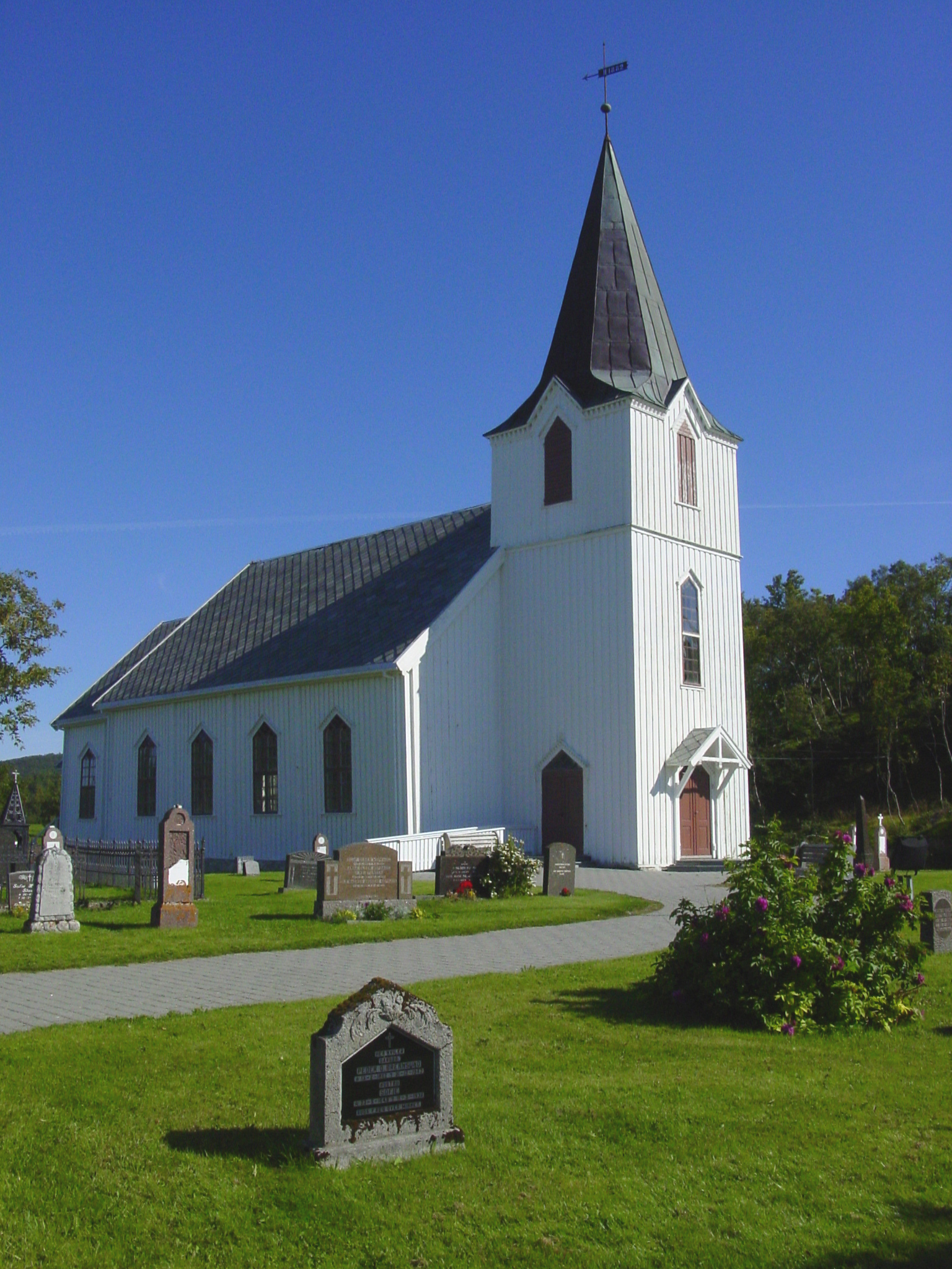 Kjerringøy kirke